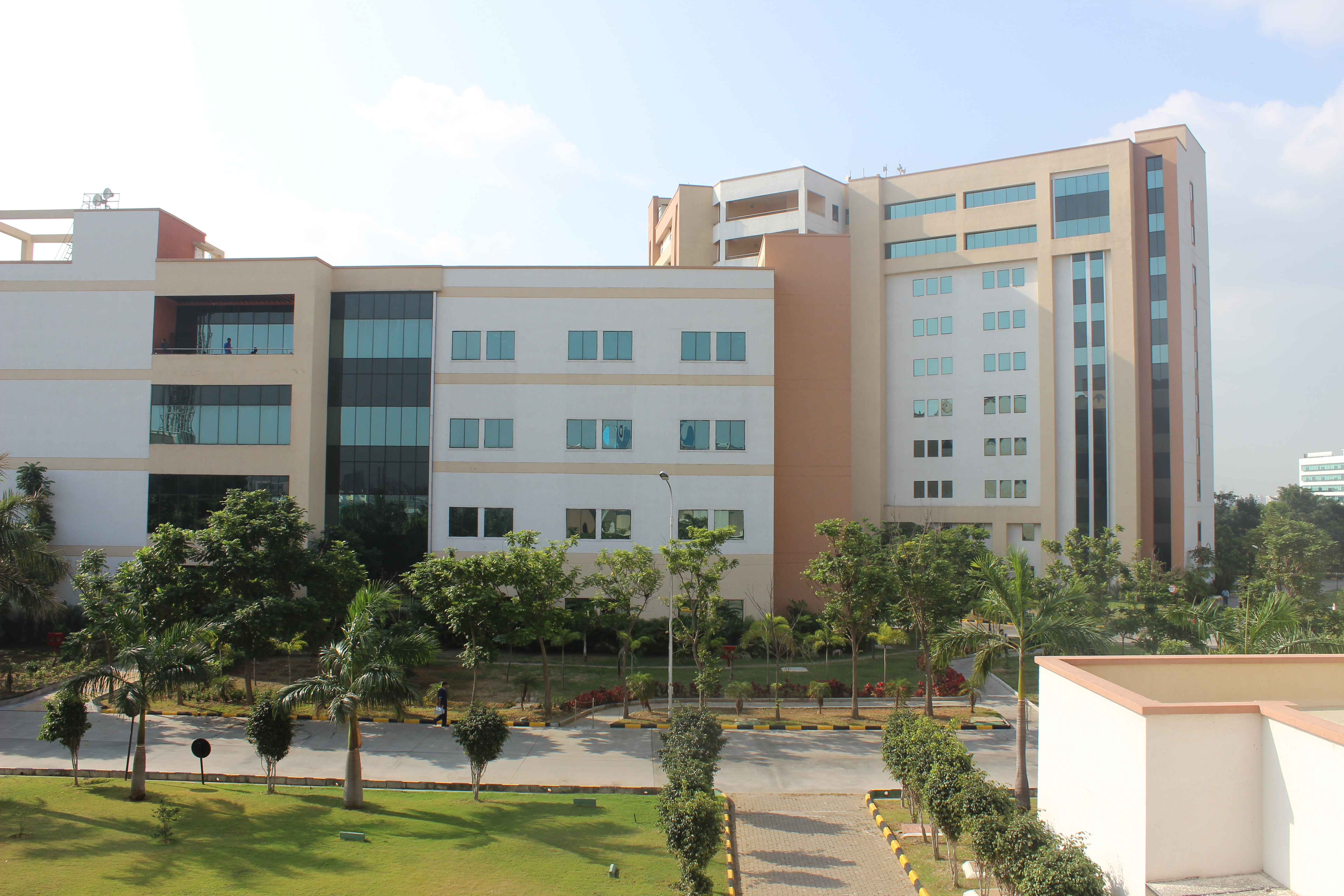 விப்ரோ, சோழிங்கநல்லூர்